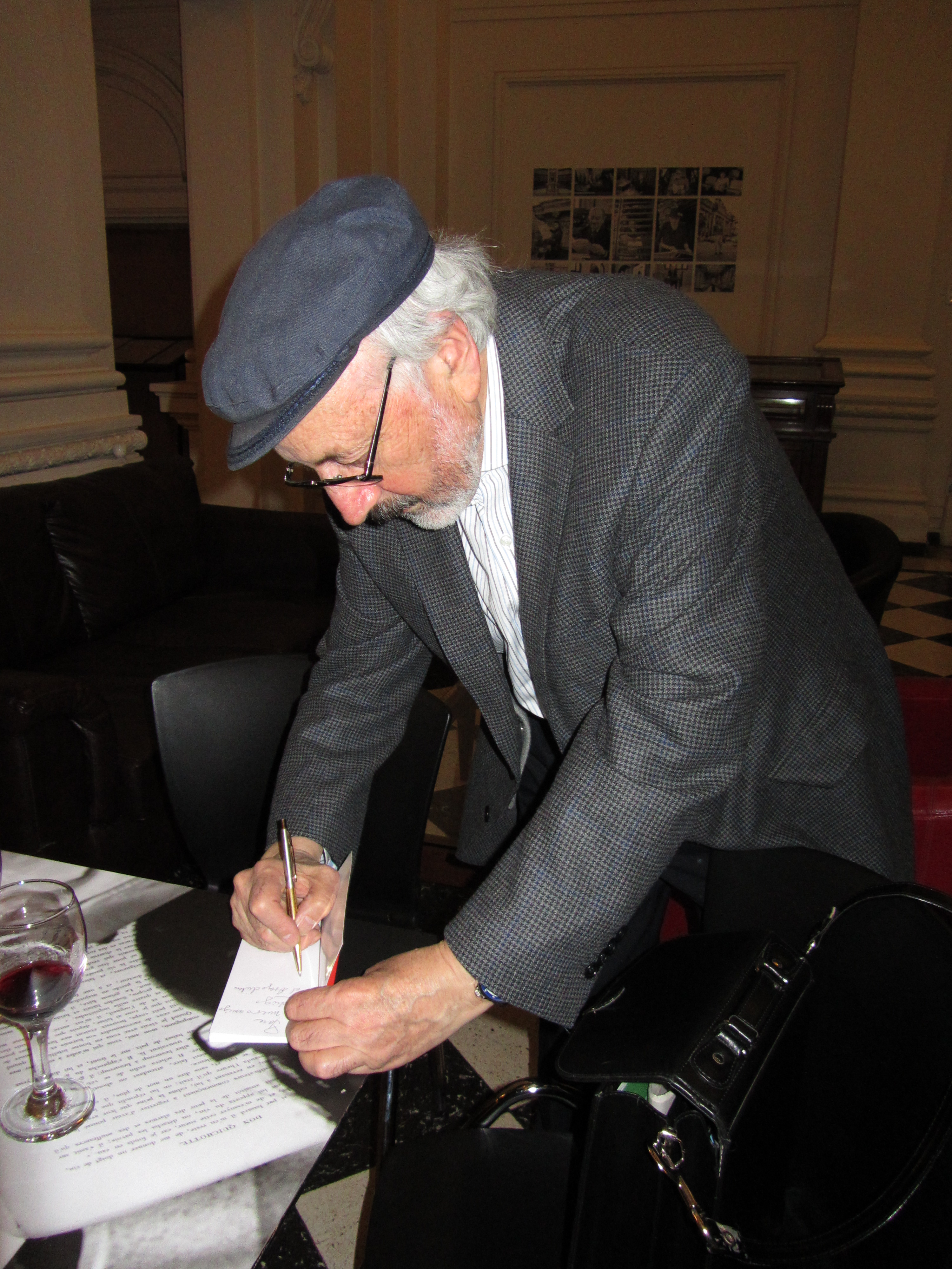 El poeta chileno Floridor Pérez firmando un autógrafo